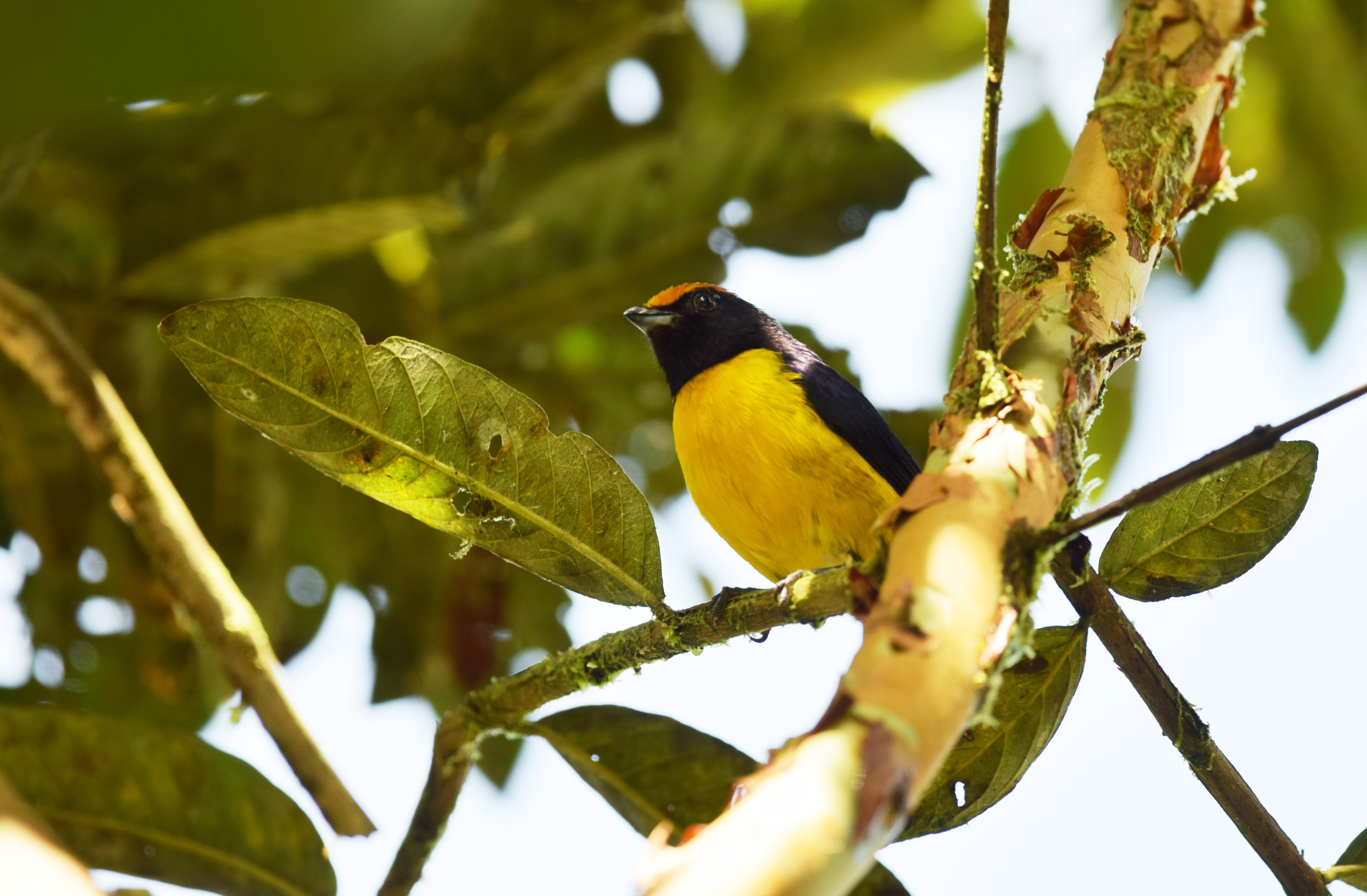 Costa Rica 2/13/16 Cerro Silencio near Rancho Naturalista